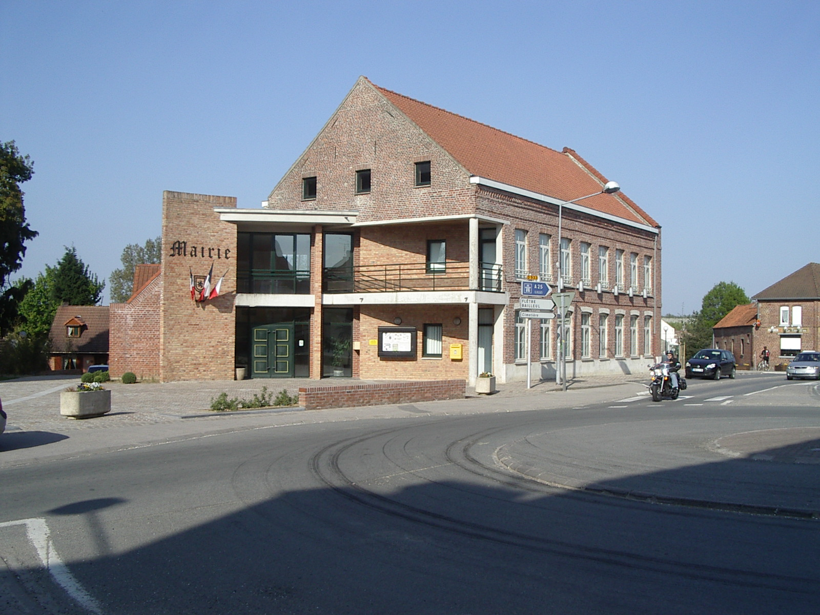 Mairie de Caëstre (Nord, France)